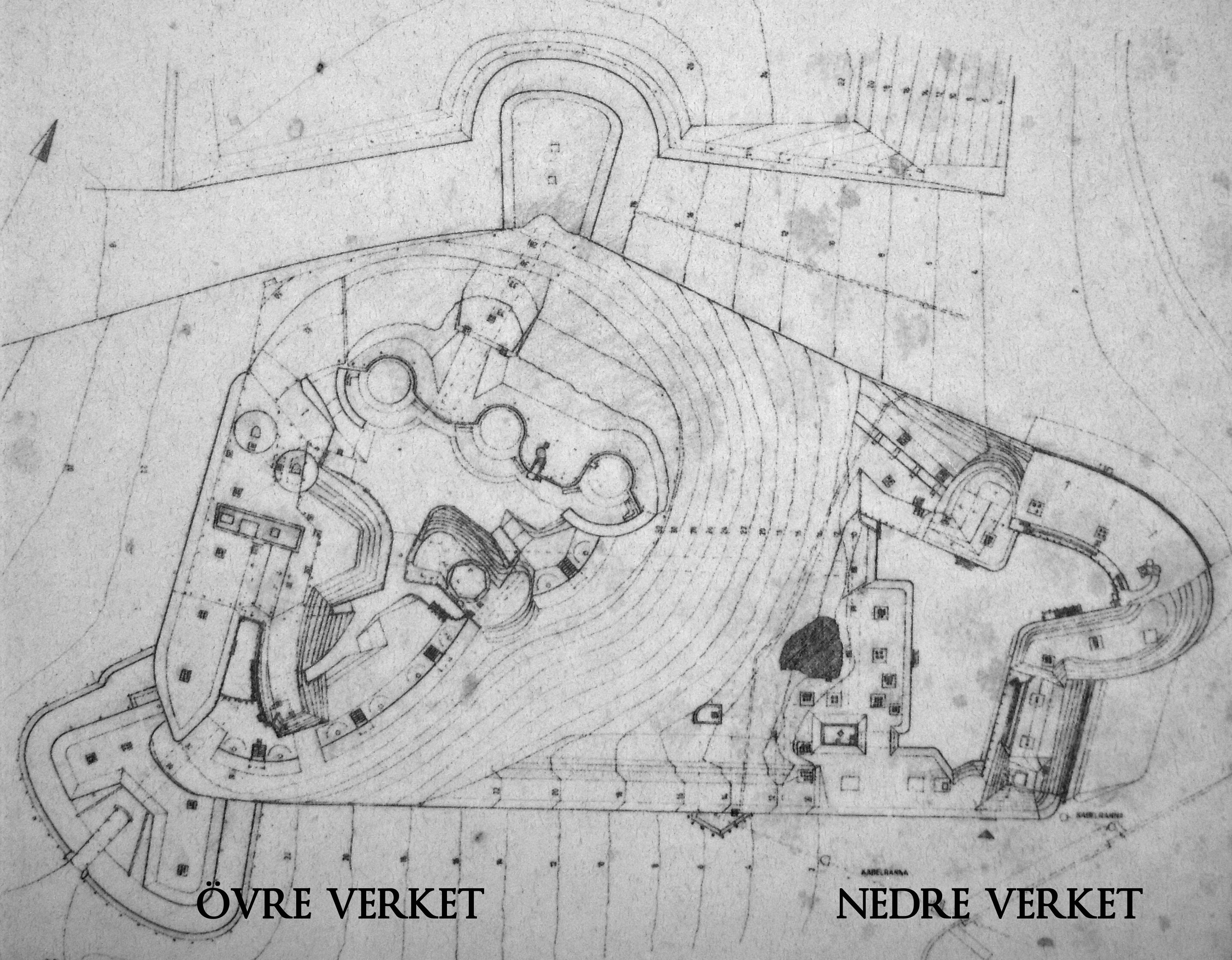 Planritning över Rindö redutt